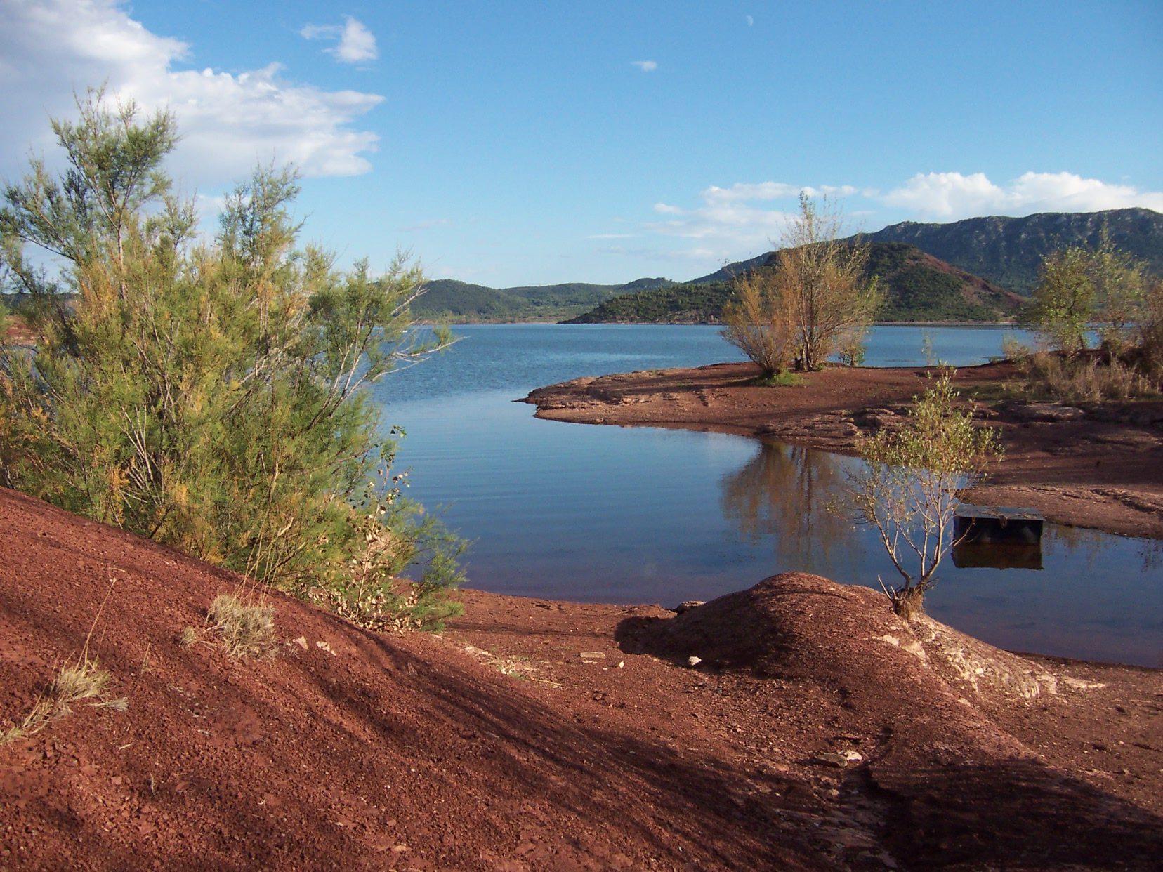 Couleurs changeantes sur le Salagou